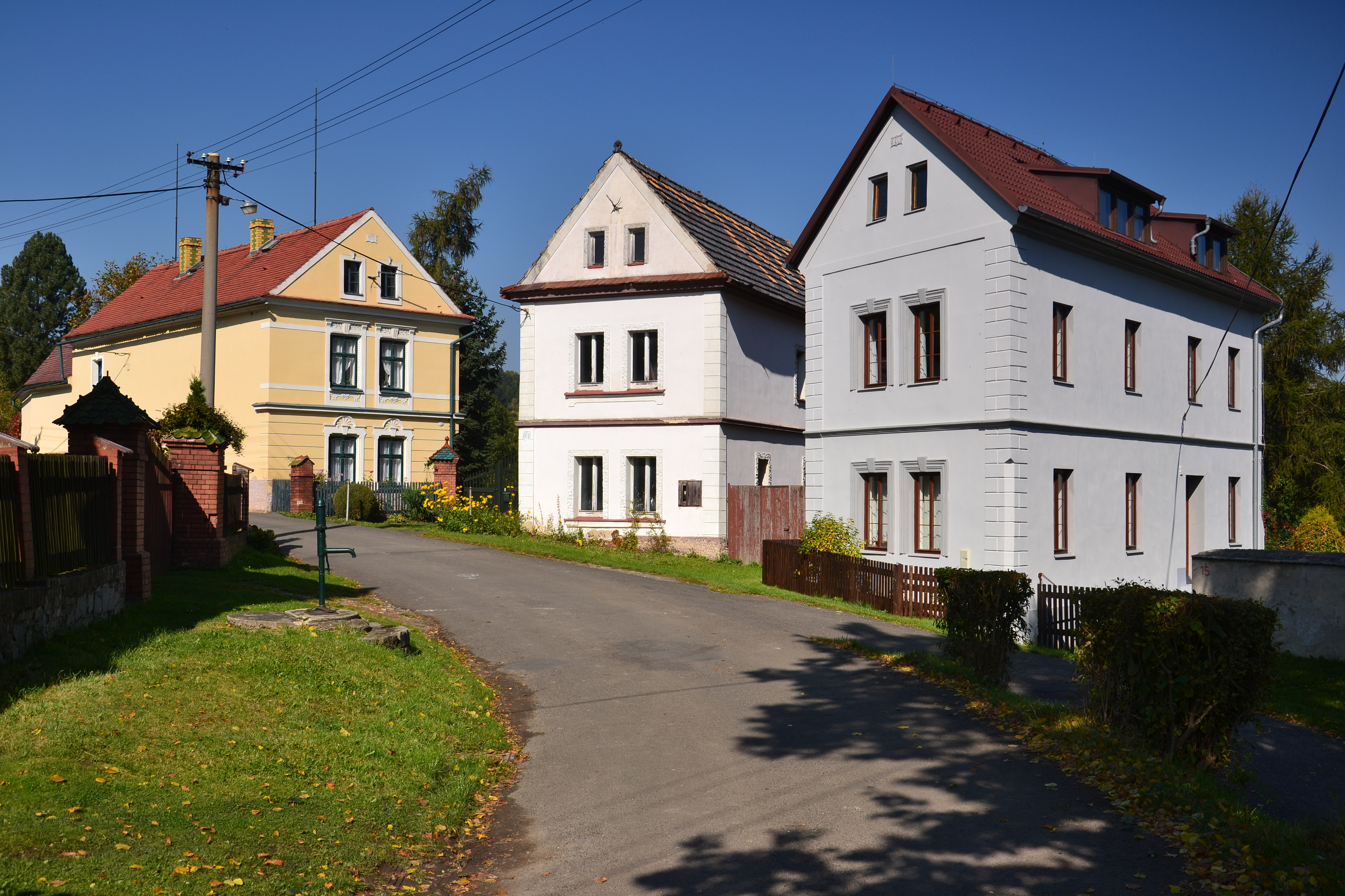 Domy na severním okraji návsi